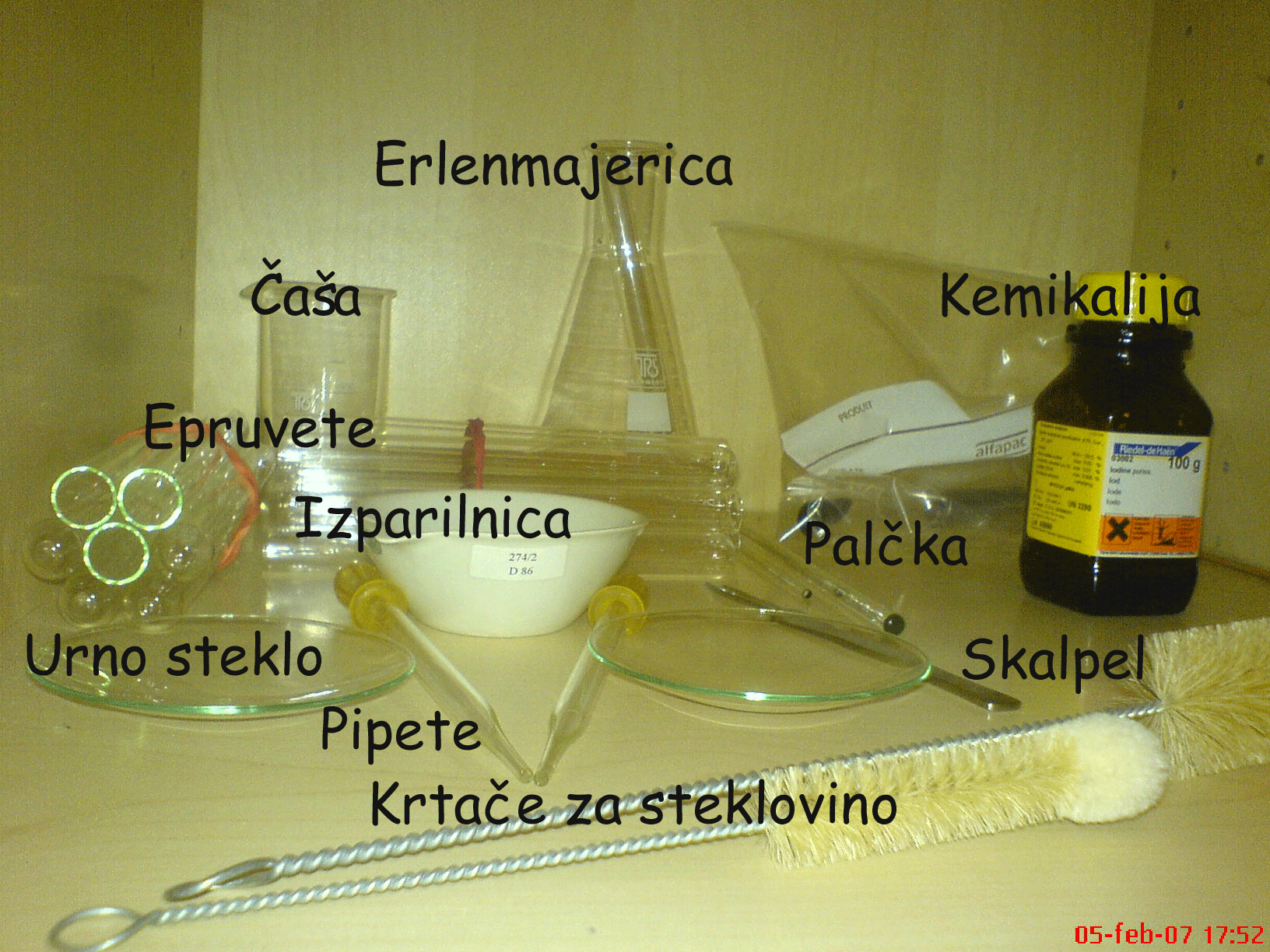 Nekaj opreme potrebna za laboratorij